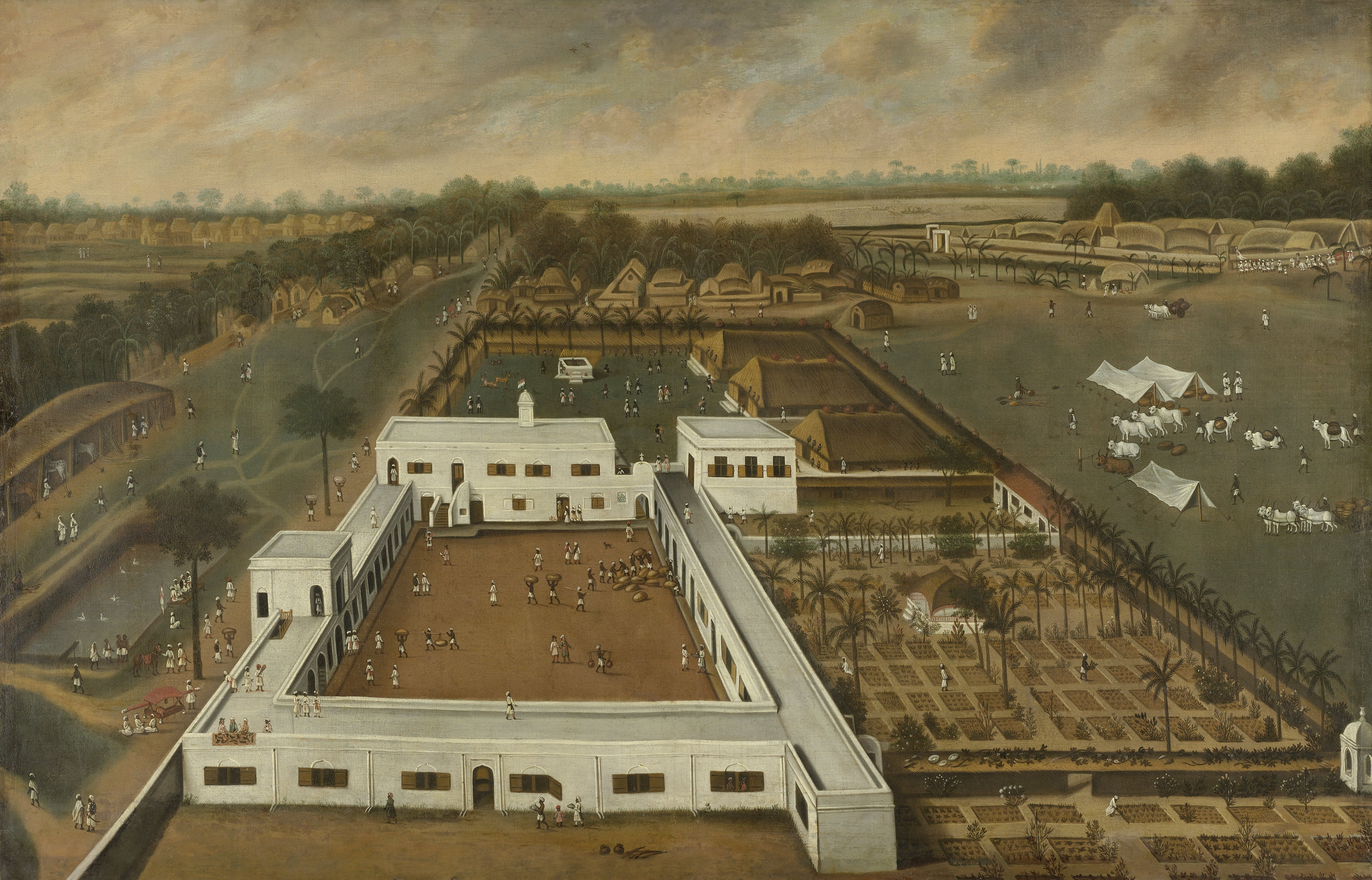 Hollandse plantage in Bengalen, waarschijnlijk de VOC-loge Kazimbazar. Links een tank met watervogels, rechts een plantage. Rechtsboven een stoet Indiërs. Pendant van SK-A-4282.